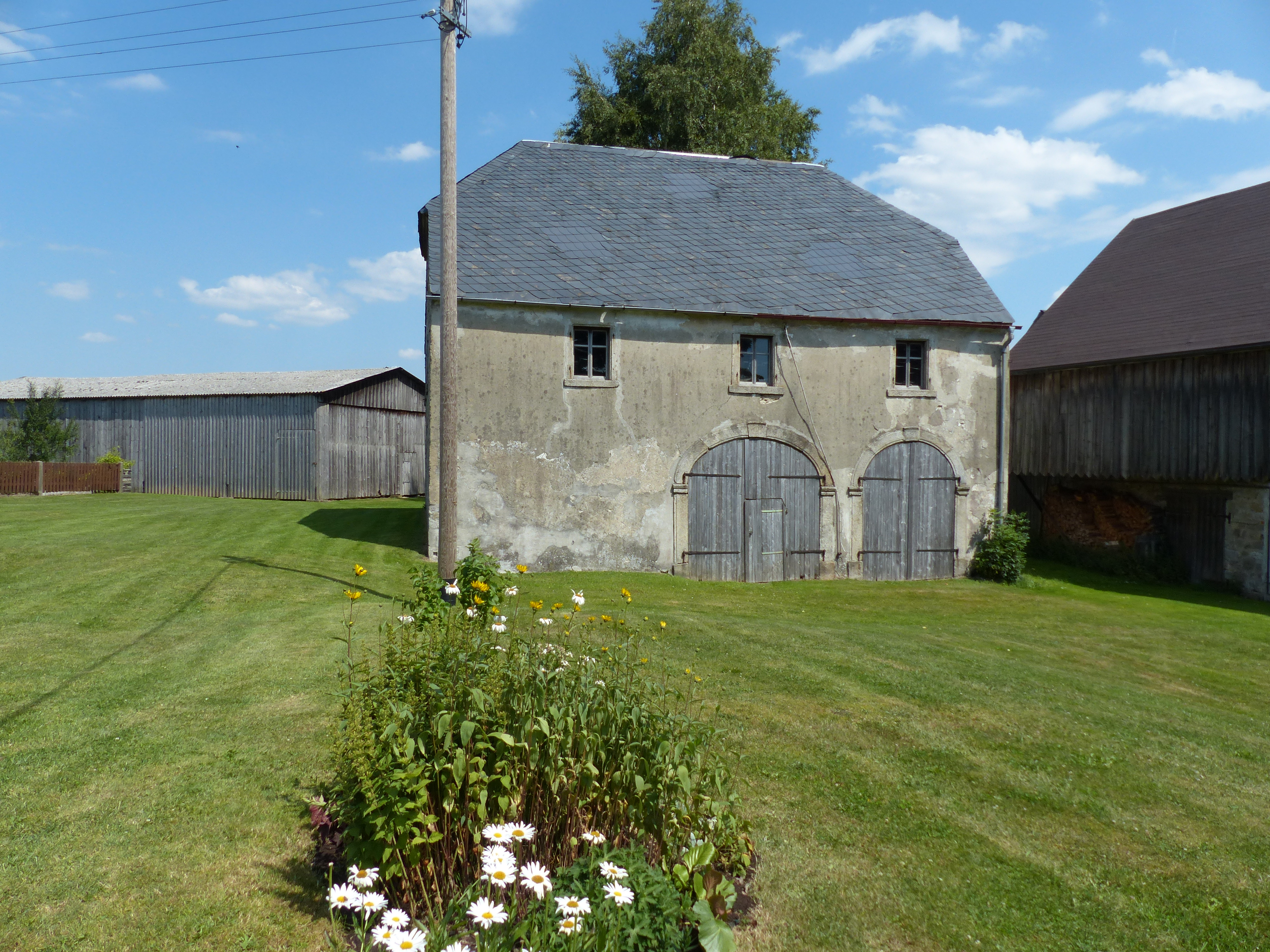 Bauwerk im Stadtgebiet von Weißenstadt